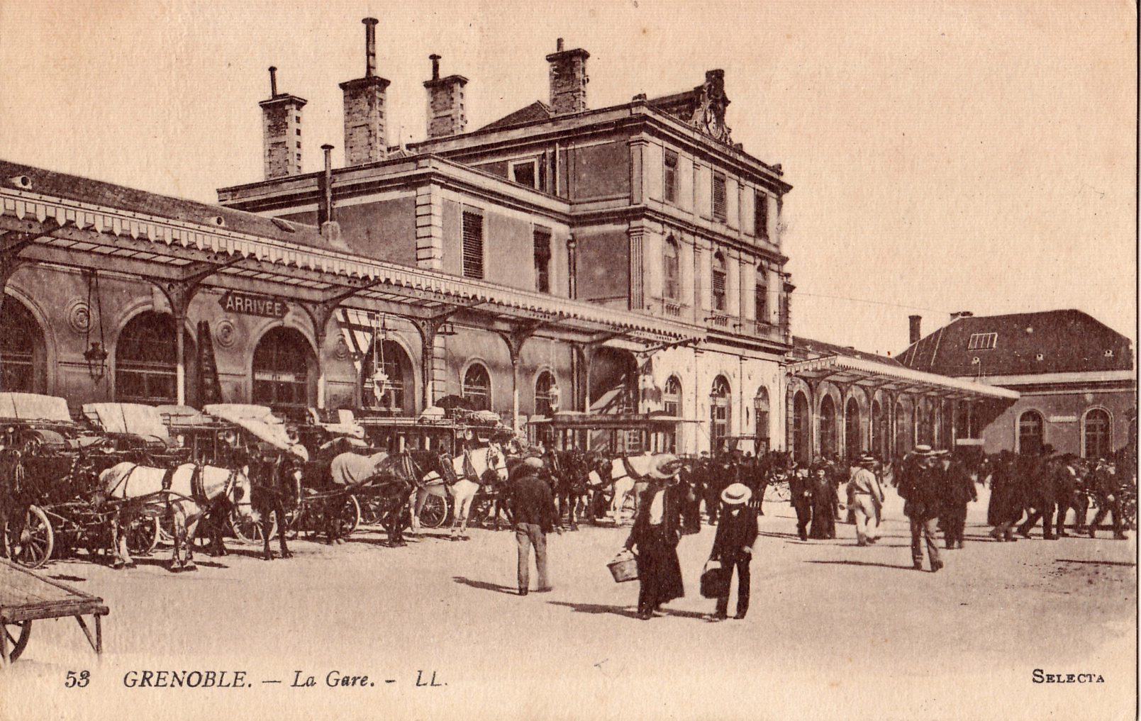 Carte postale ancienne éditée par LL, n°53, colection Selecta : GRENOBLE - La Gare